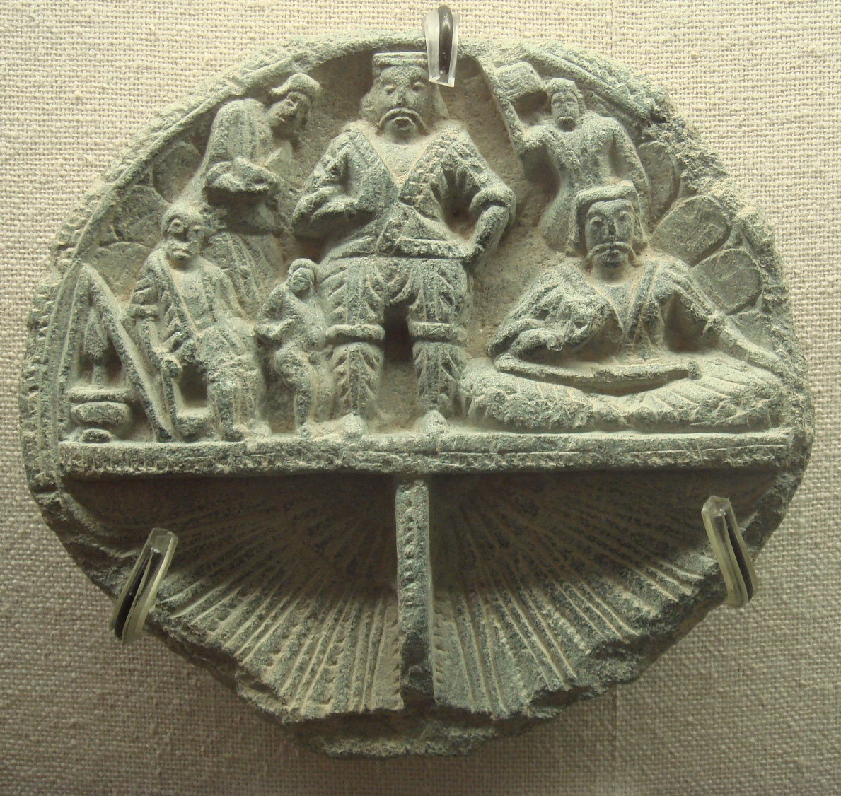 Yuezhi king and attendants.